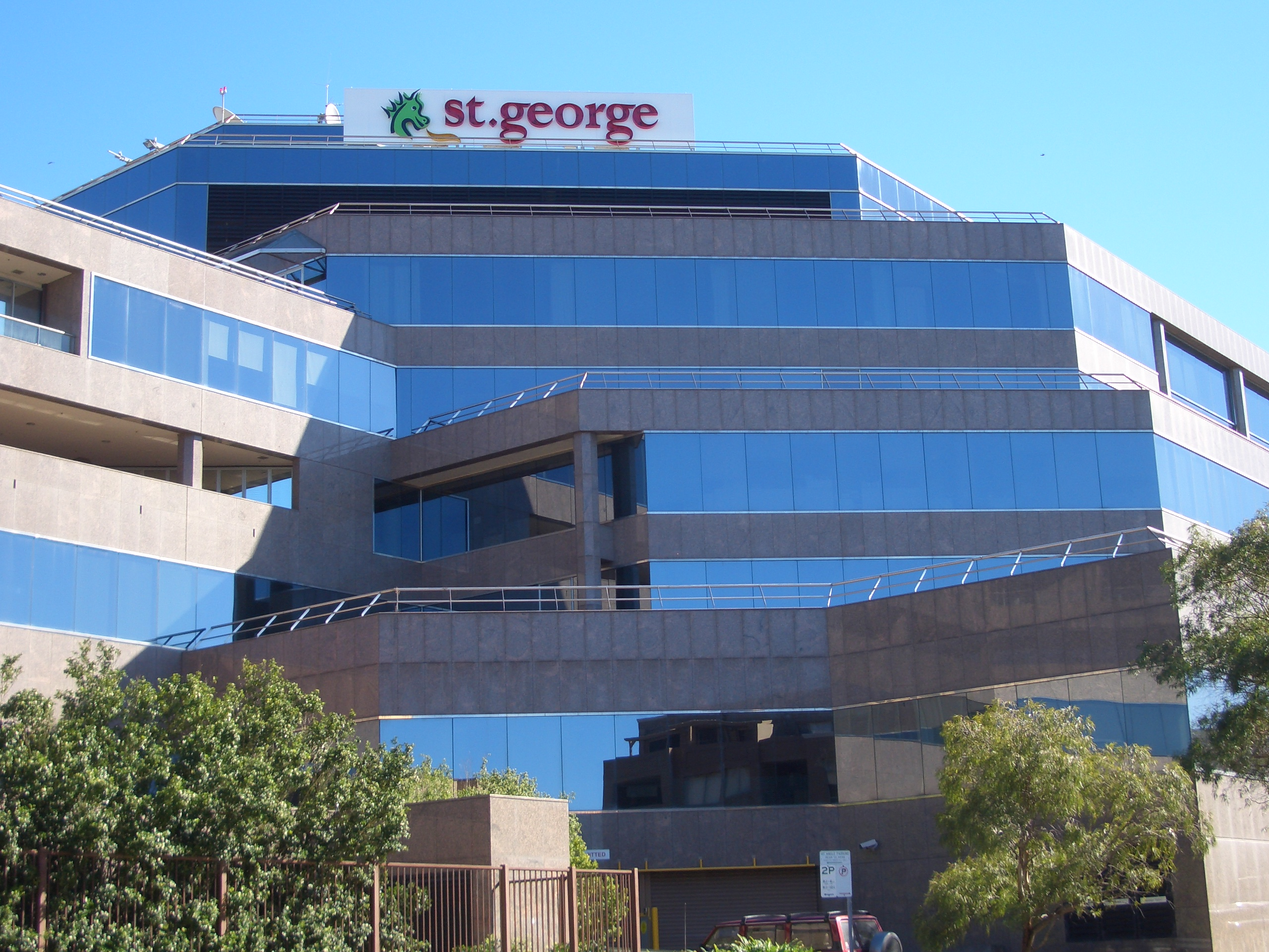 St_George_Bank Headquarters, Kogarah view from Premier Street